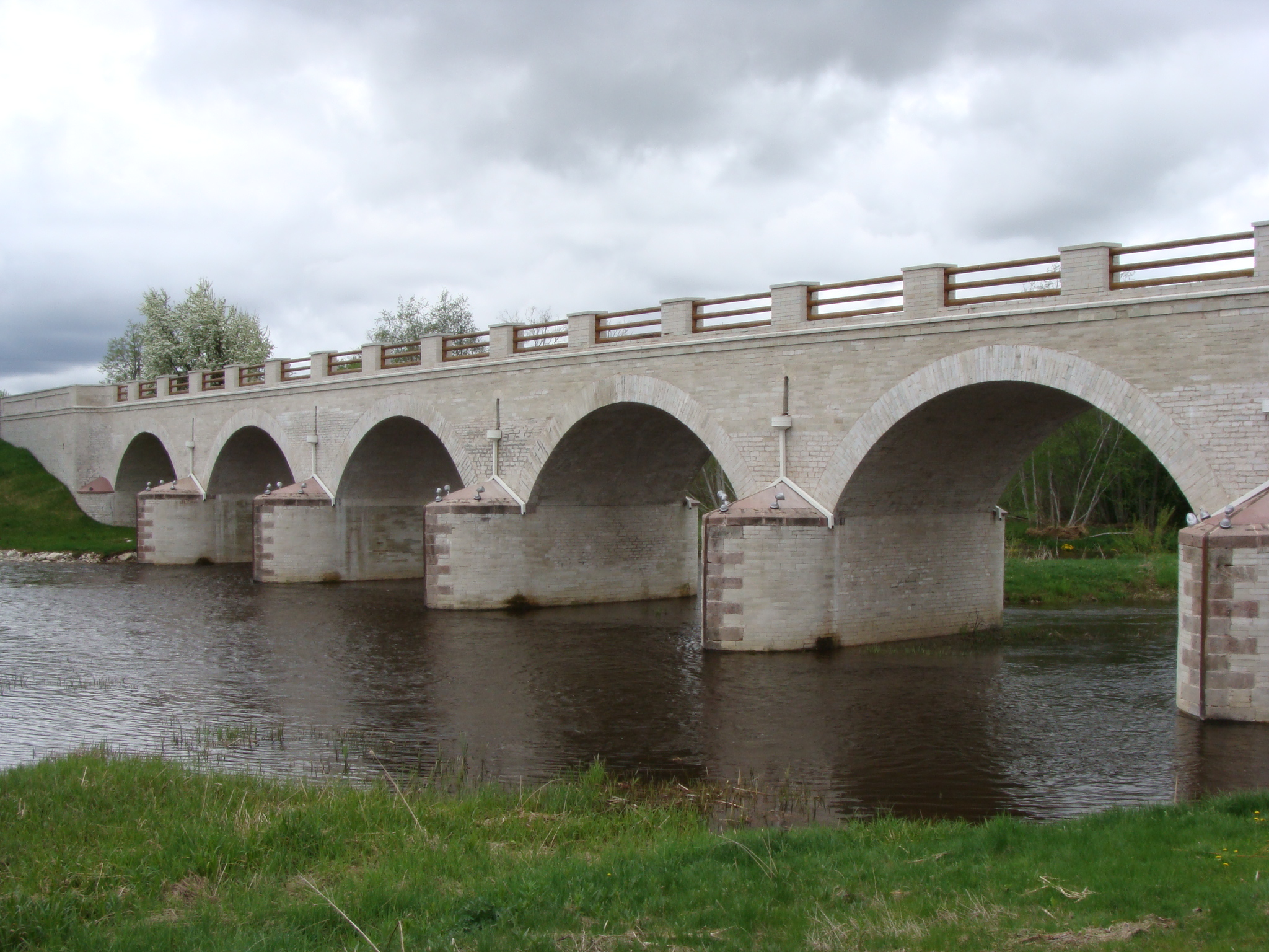 Konuvere kivisild